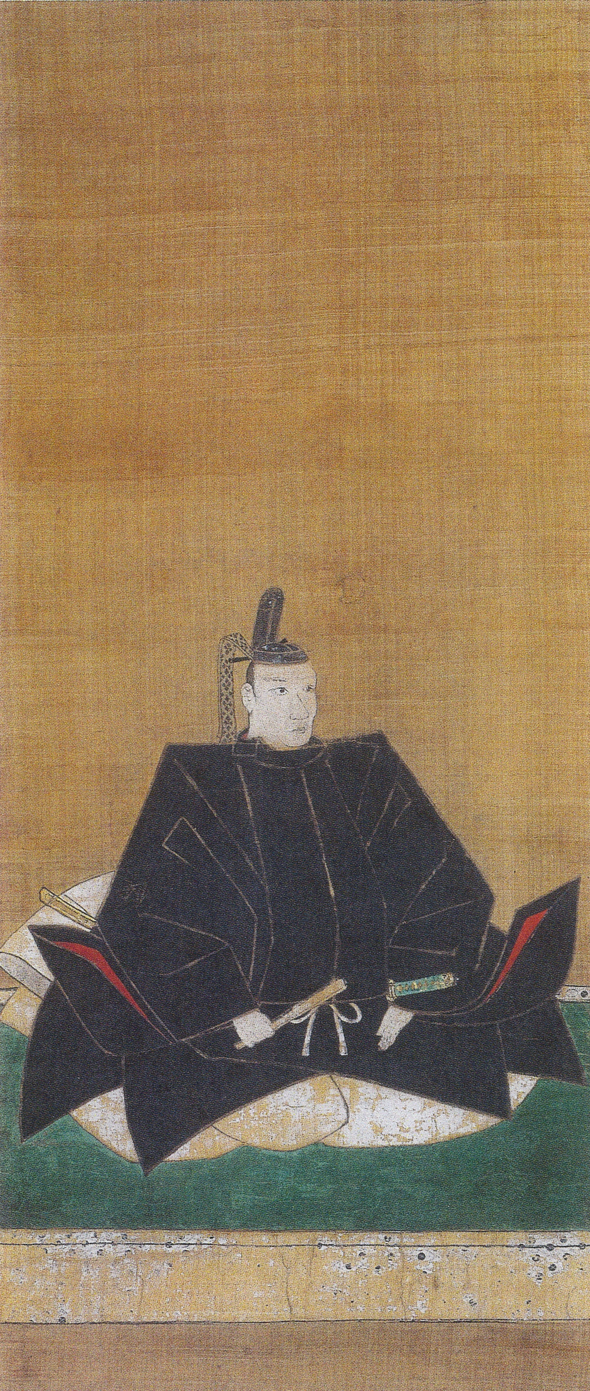 加納藩主奥平忠政の肖像。